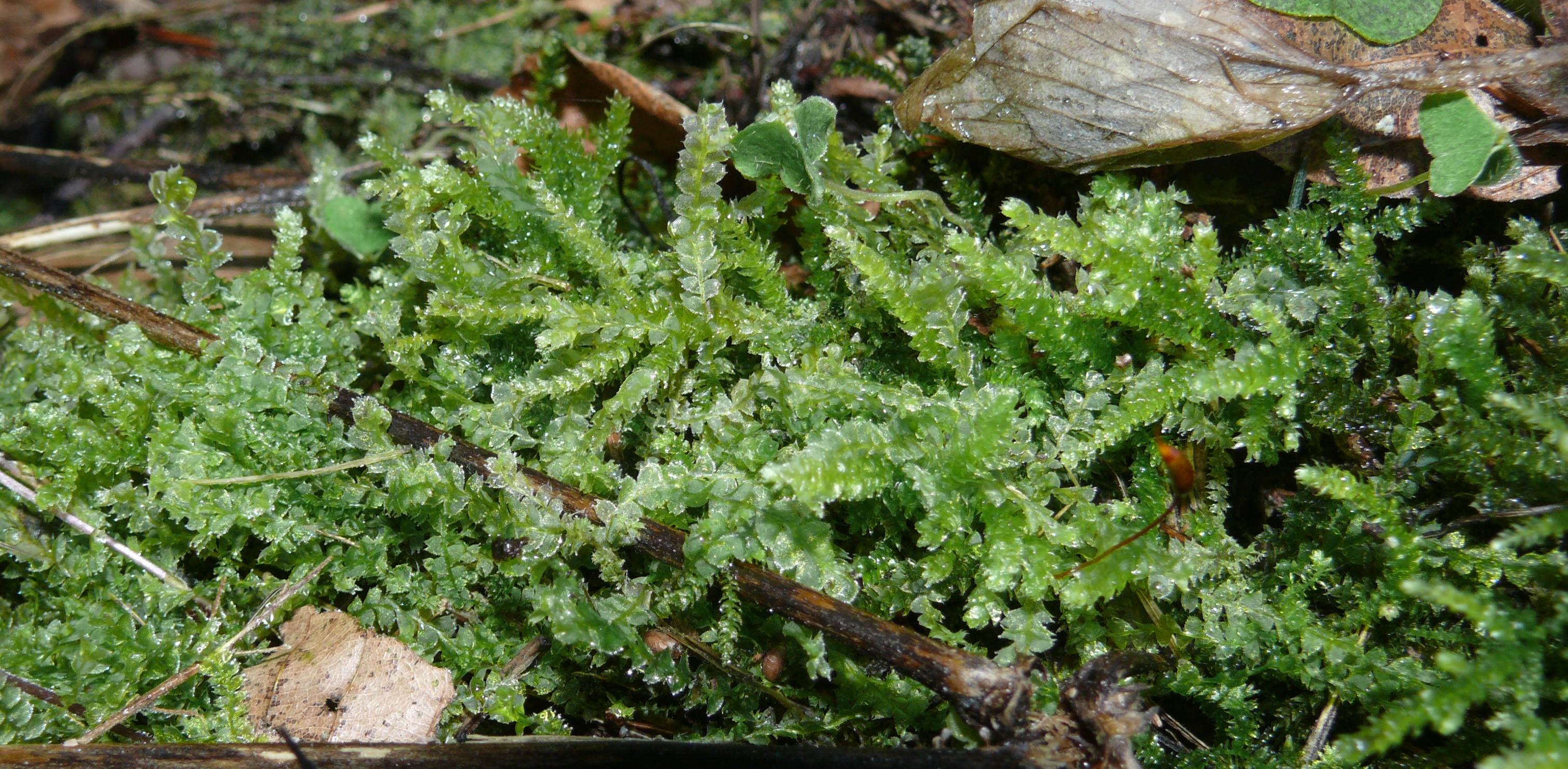 Lophocolea bidentata, Schwäbisch-Fränkische Waldberge, Germany